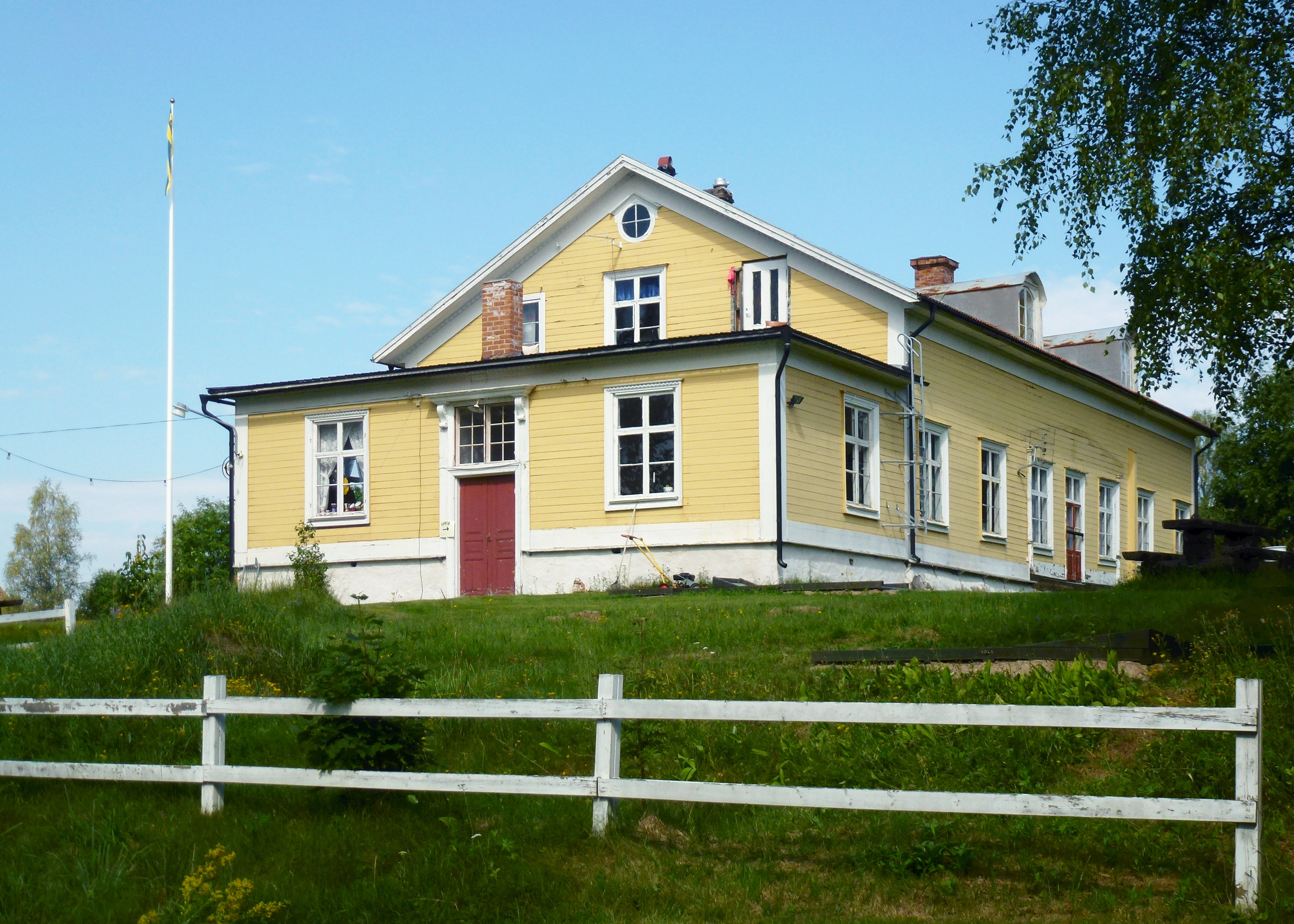 Lindesnäs herrgård